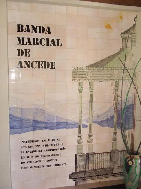 Painel de Azulejo na Sede da Banda Marcial de Ancede.